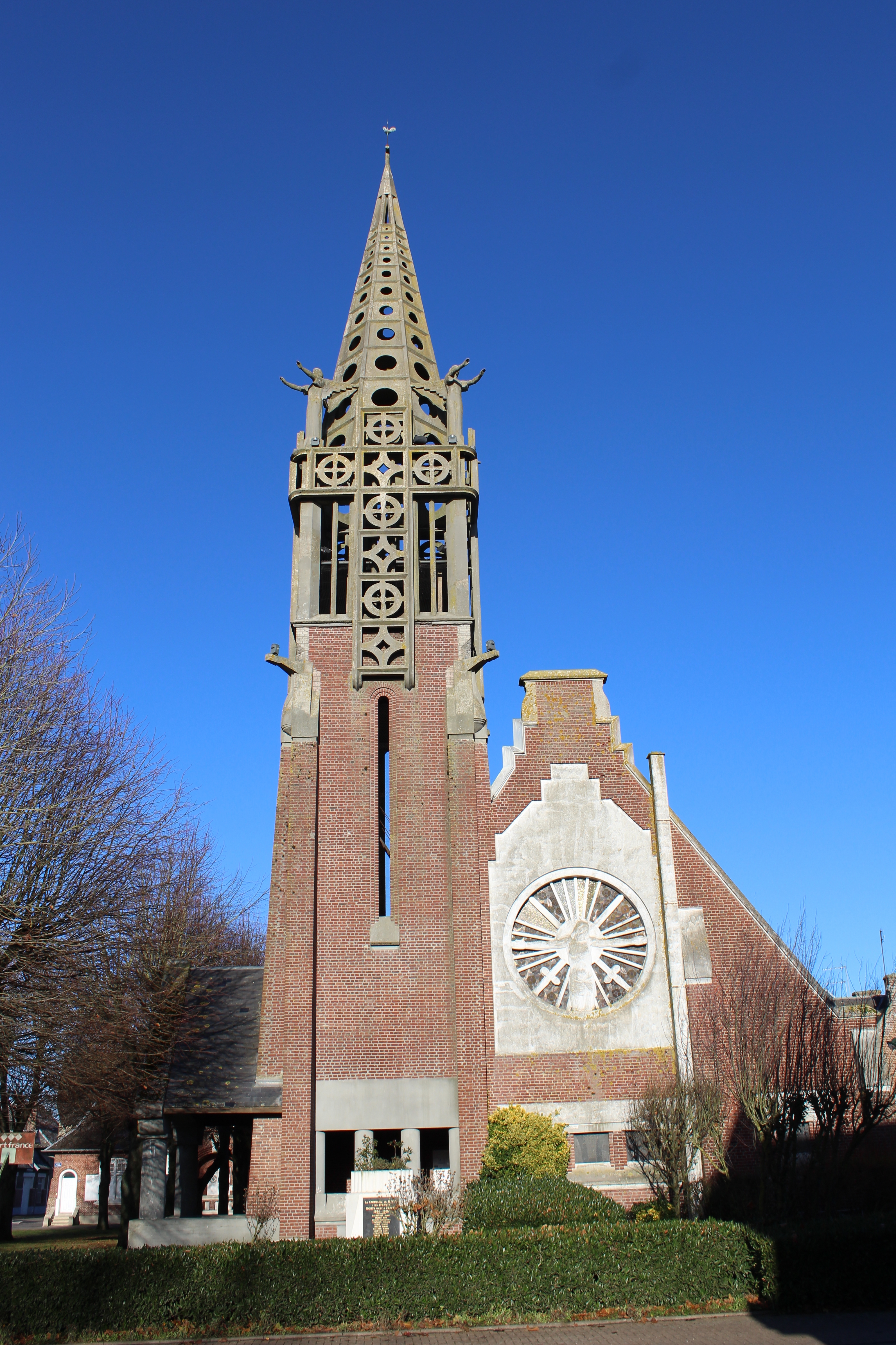 L'église.